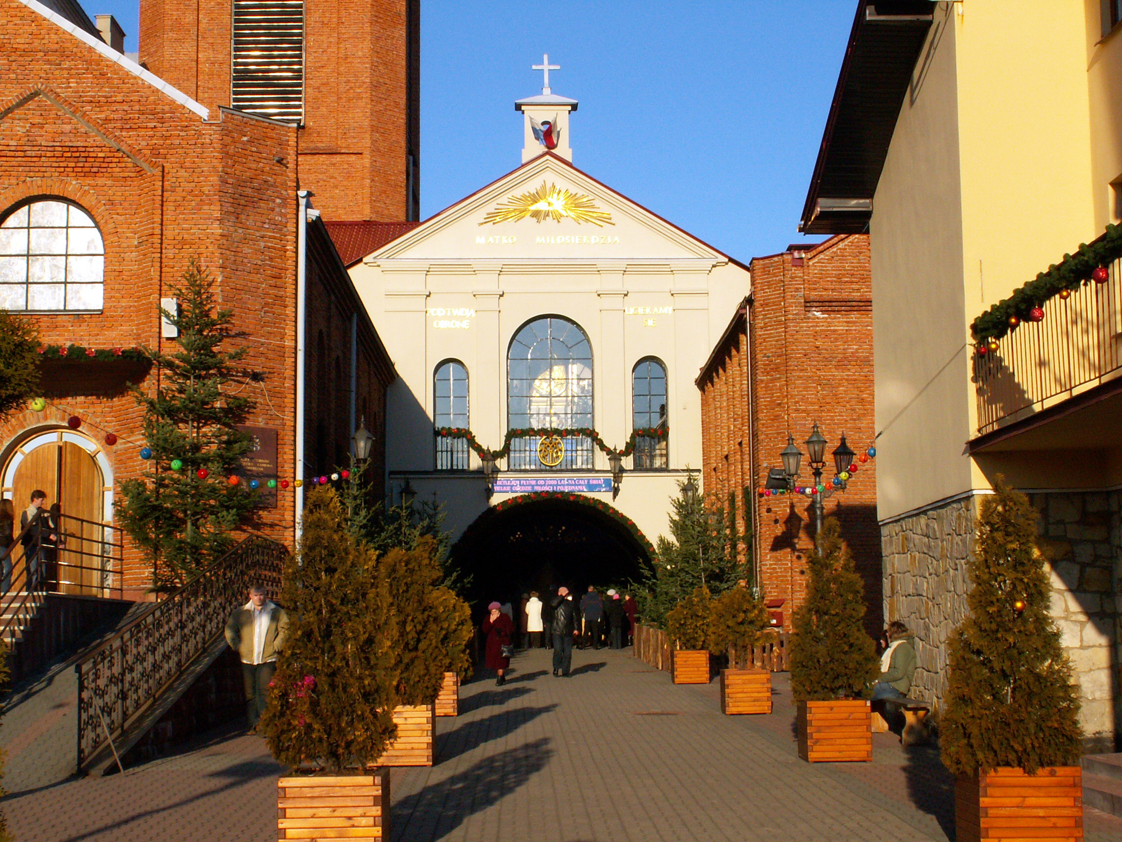 Matka Boska Ostrobramska Sanctuary in Skarżysko-Kamienna, Poland